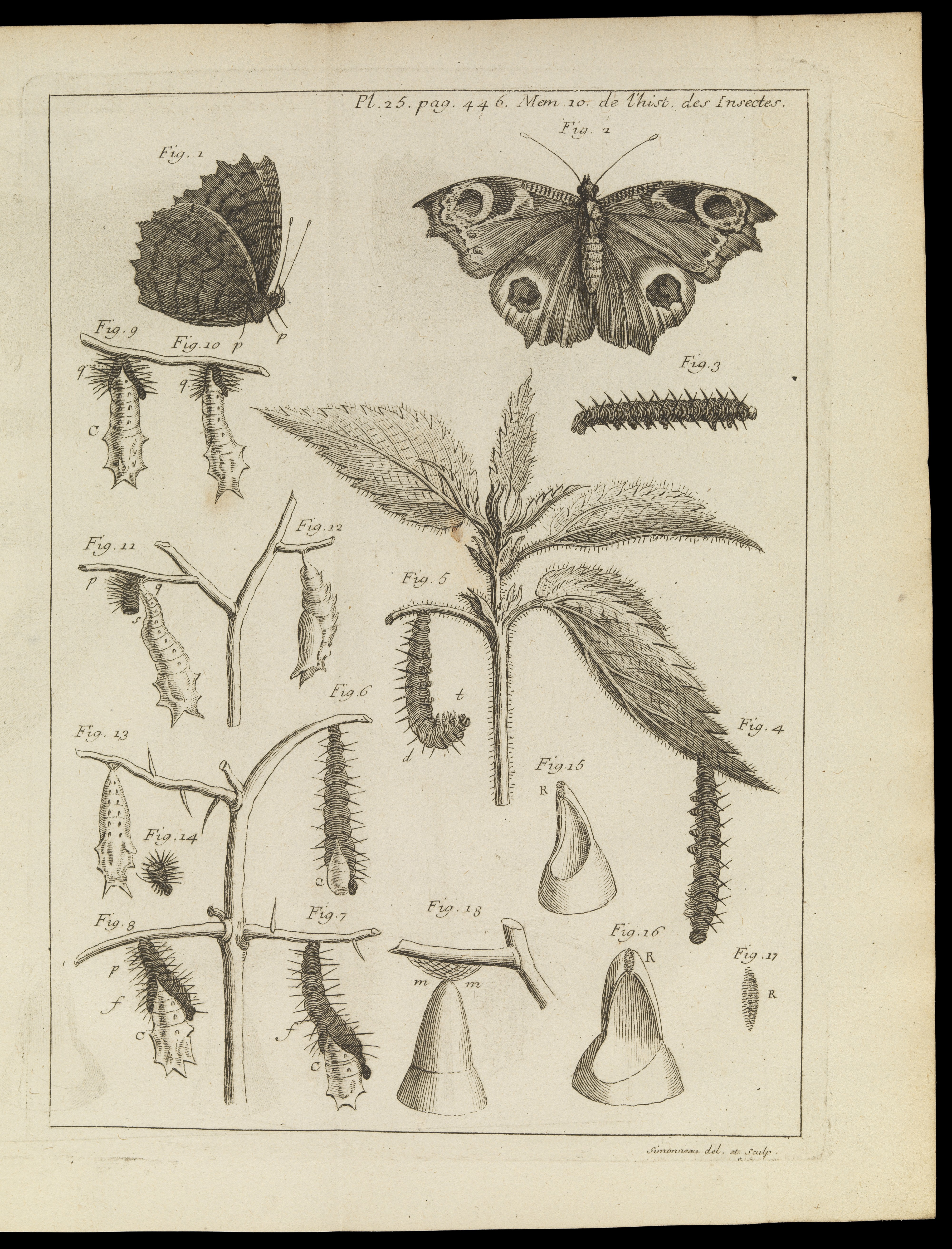 Plate 25 from Volume 1 of Mémoires pour servir à l'histoire des insectes, by René-Antoine Ferchault de Réaumur. Rare Books